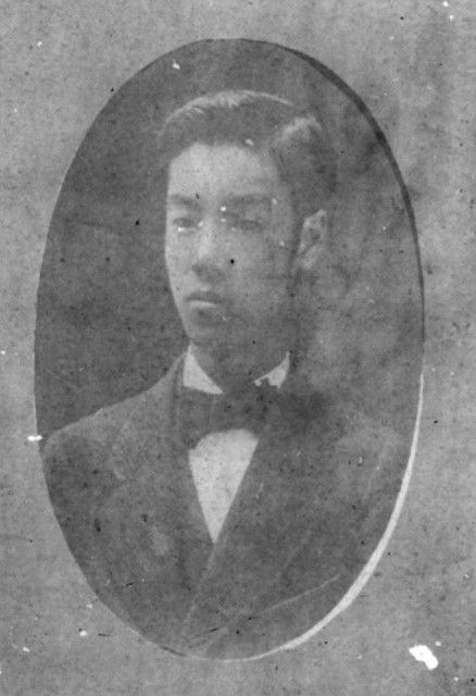 松平慶倫の肖像写真。